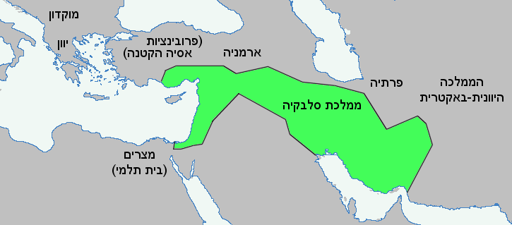 ממלכת סלבקיה בשנת 185 לפנה"ס (גבולות מקורבים). זוהי הממלכה שהעביר he:אנטיוכוס השלישי (הגדול) ליורשו, לאחר "שלום אַפָּמֵאָה". מבוסס על "האטלס ההיסטורי - תולדות העולם", הוצאת "משכל" 1989, עמ' 53. קווי המתאר של המפה מבוססים על מפות ה-CIA World Factbook.